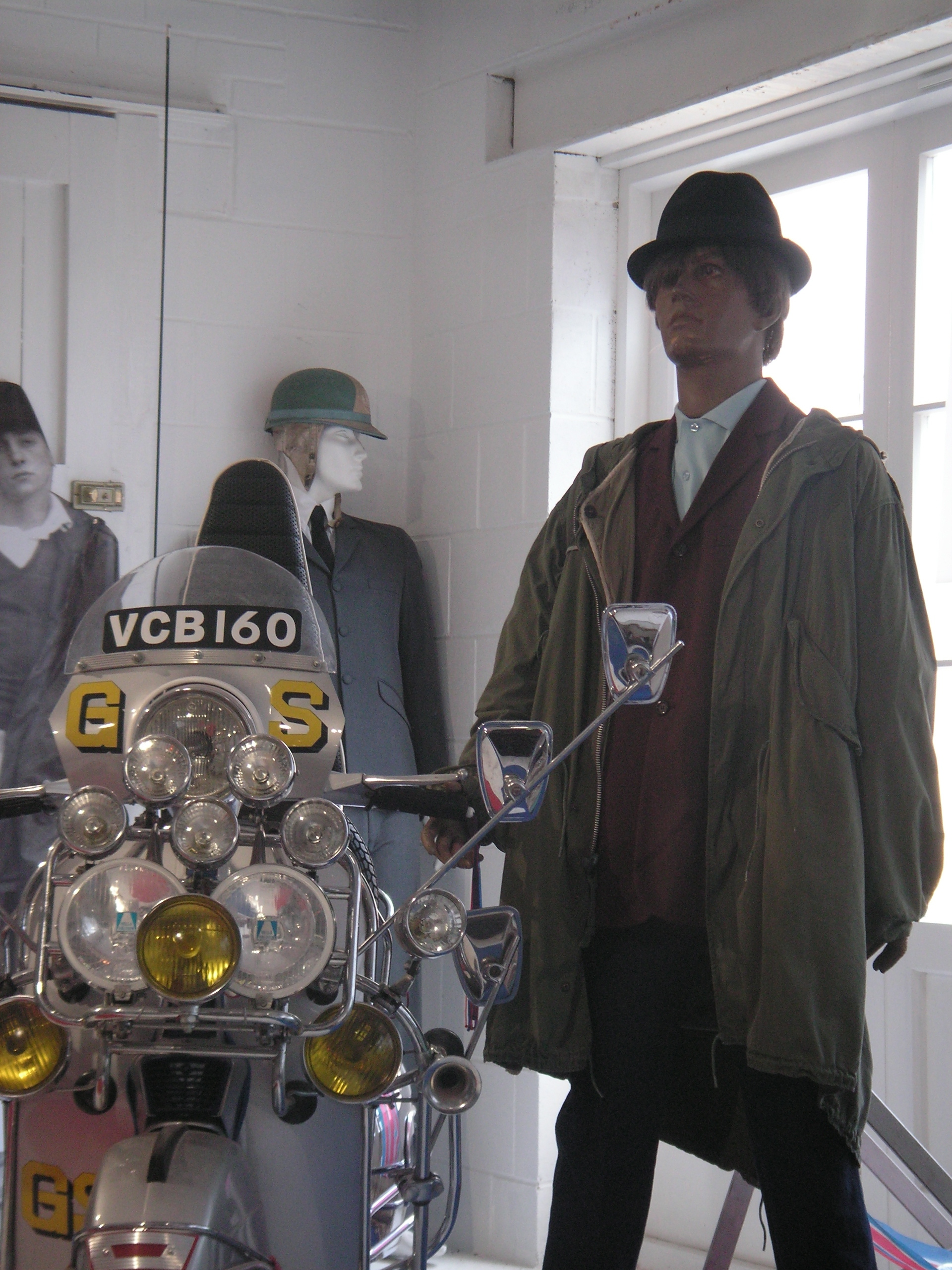 Quadrophenia exhibit Mods!